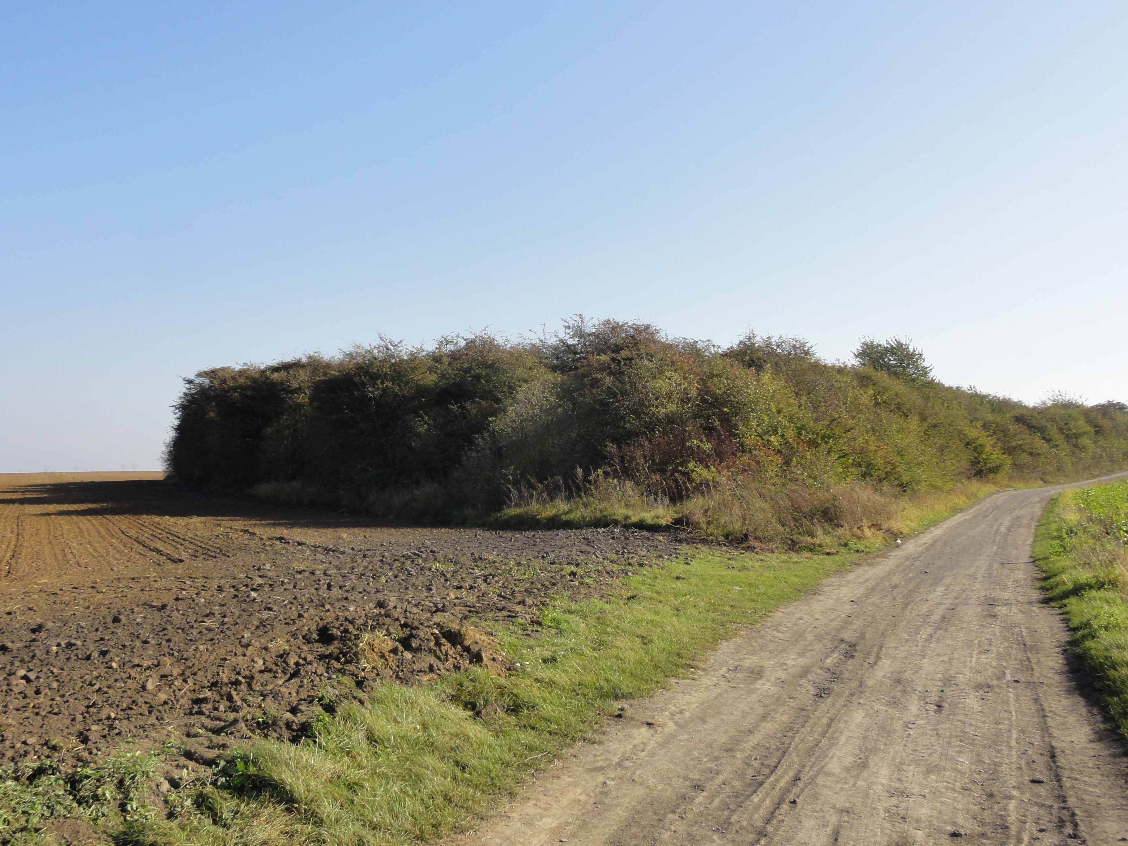 Terril n° 69 dit 2 de Meurchin, Fosse n° 2 - 7 de la Compagnie des mines de Meurchin, Meurchin, Pas-de-Calais, Nord-Pas-de-Calais, France.